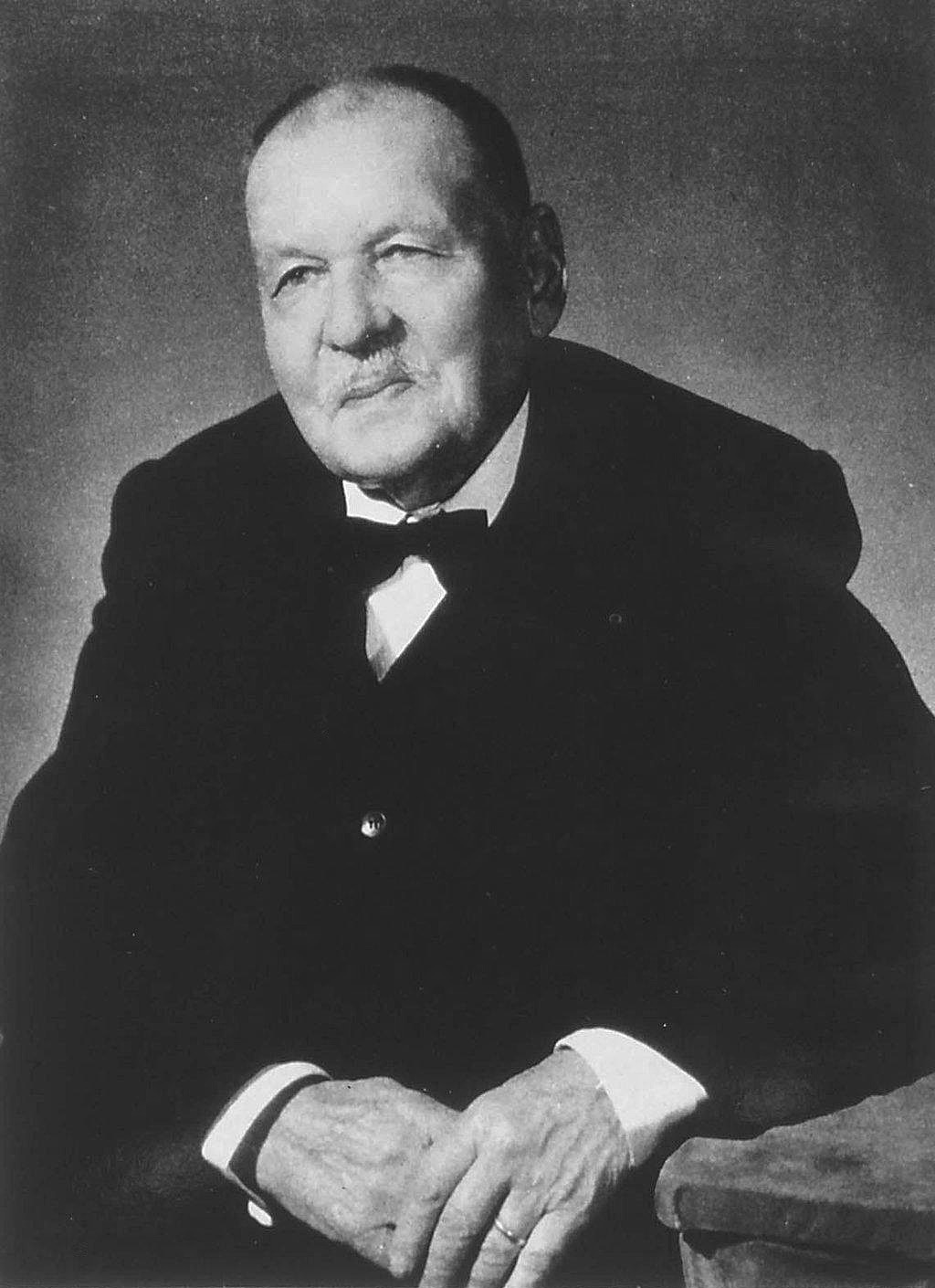 André Piganiol : [Buste, 3/4 g.] : [Archéologue français, professeur de civilisation romaine au Collège de France ]. Bibliothèque nationale et universitaire de Strasbourg